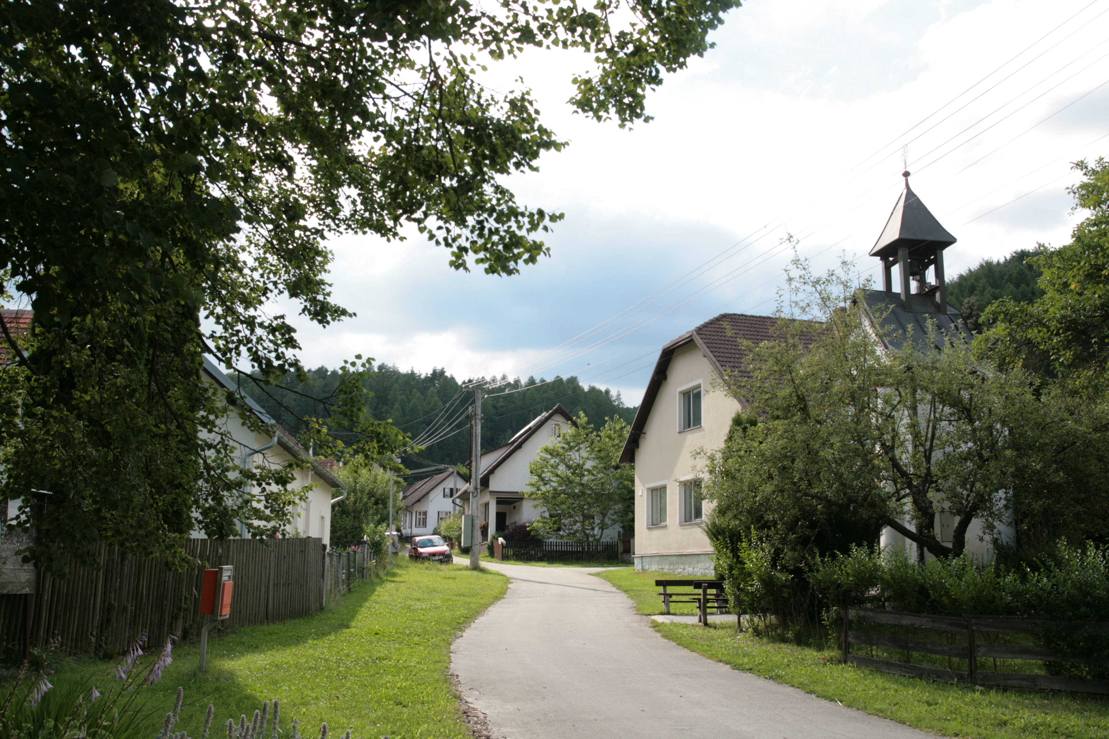 Vesnice Vlkov, část obce Stvolová v okrese Blansko. Průhled ulicí západně od návsi, vpravo kaple sv. Cyrila a Metoděje.